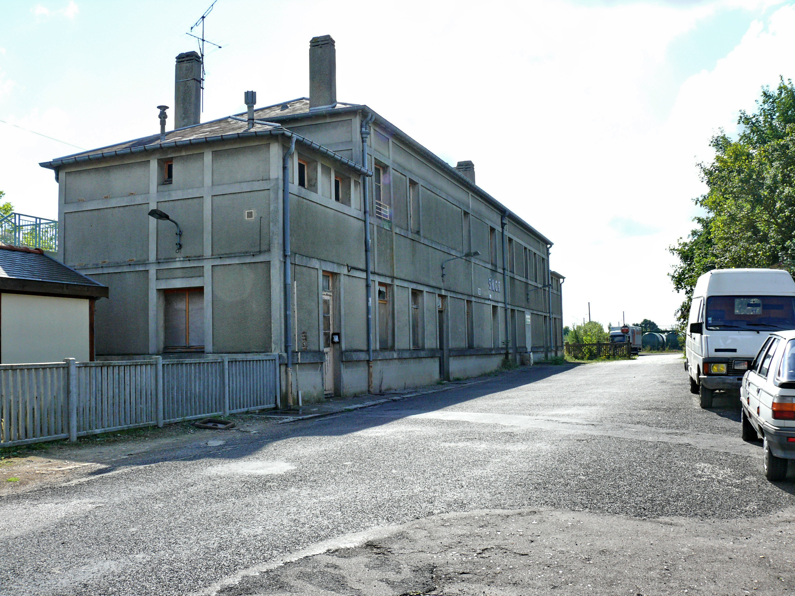 La Gare de Boves (Somme - Picardie - France)